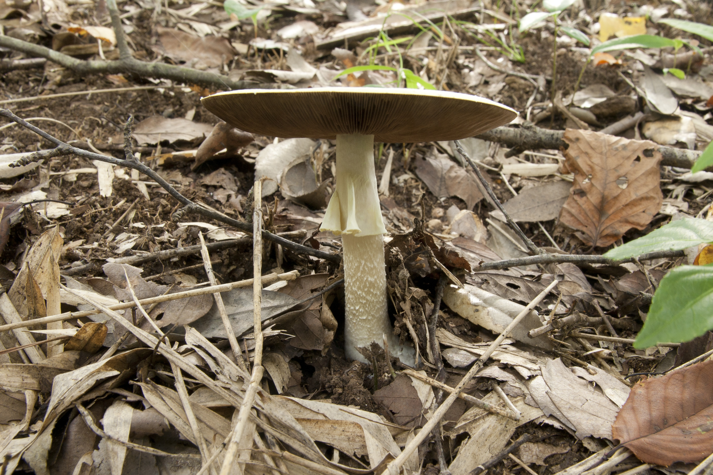 ハラタケ属 ウスキモリノカサ (学名：Agaricus abruptibulbus)